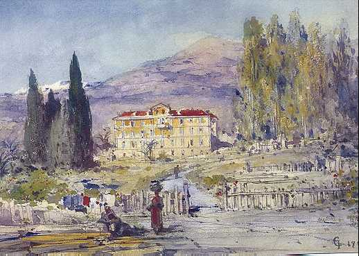 La villa Tiranty située approximativement vers l'actuelle rue Gioffredo.